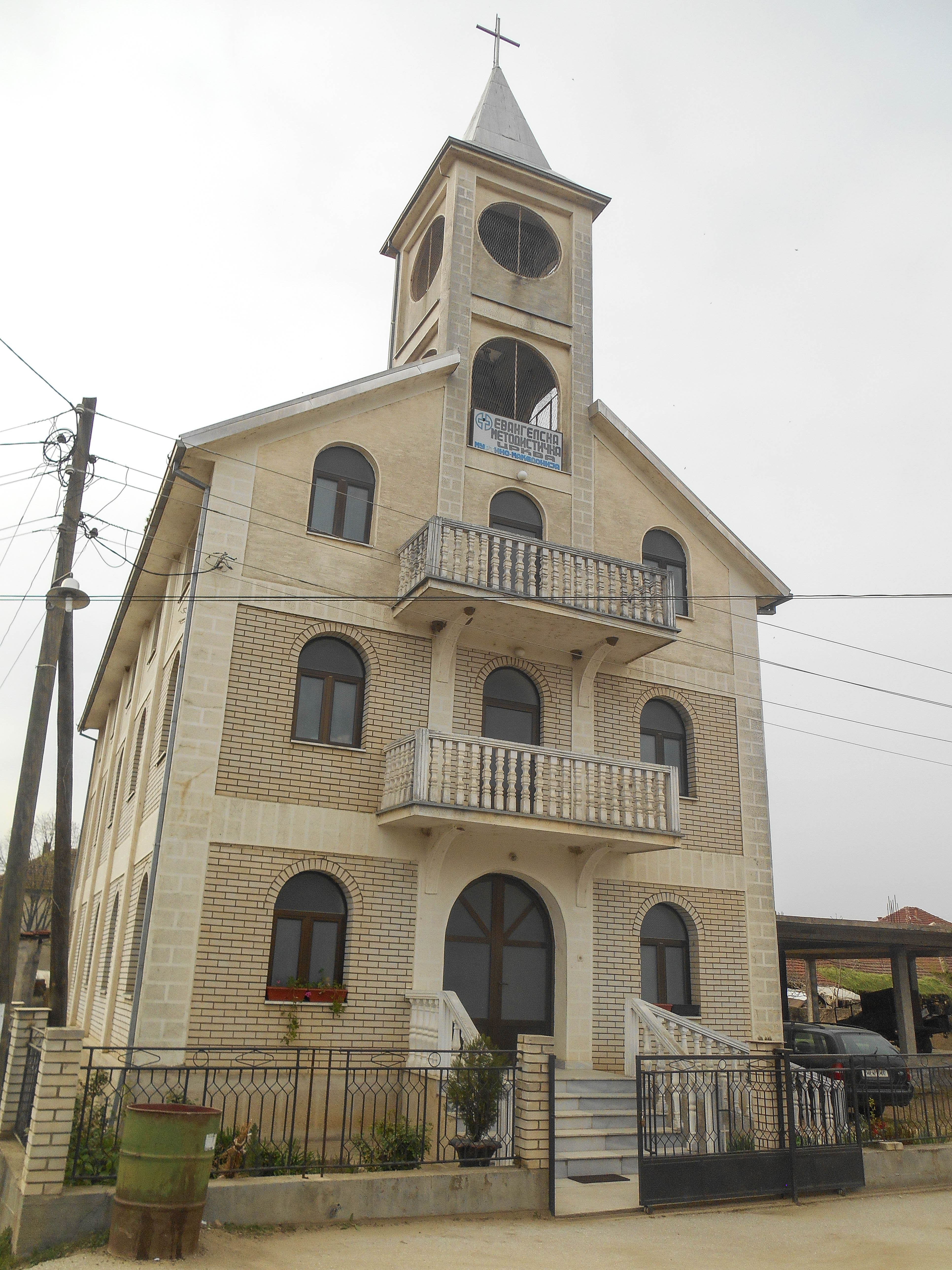 Евангелско-методистичка црква - Муртино